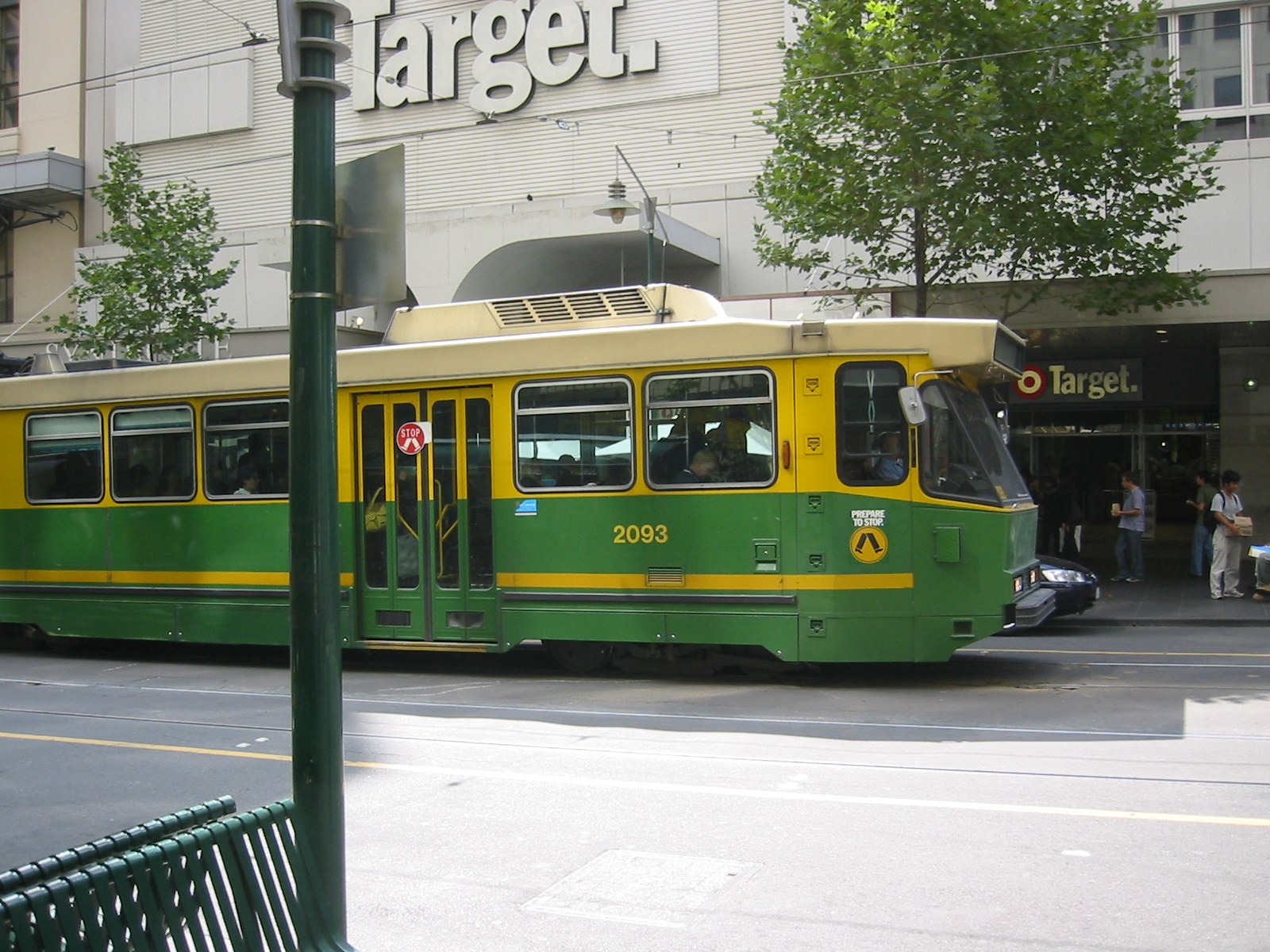 Tram in Melbourne